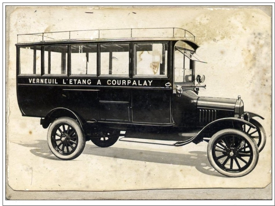 L'autobus de la ligne de Verneuil-l'Etang à Courpalay au début du XXème siècle.